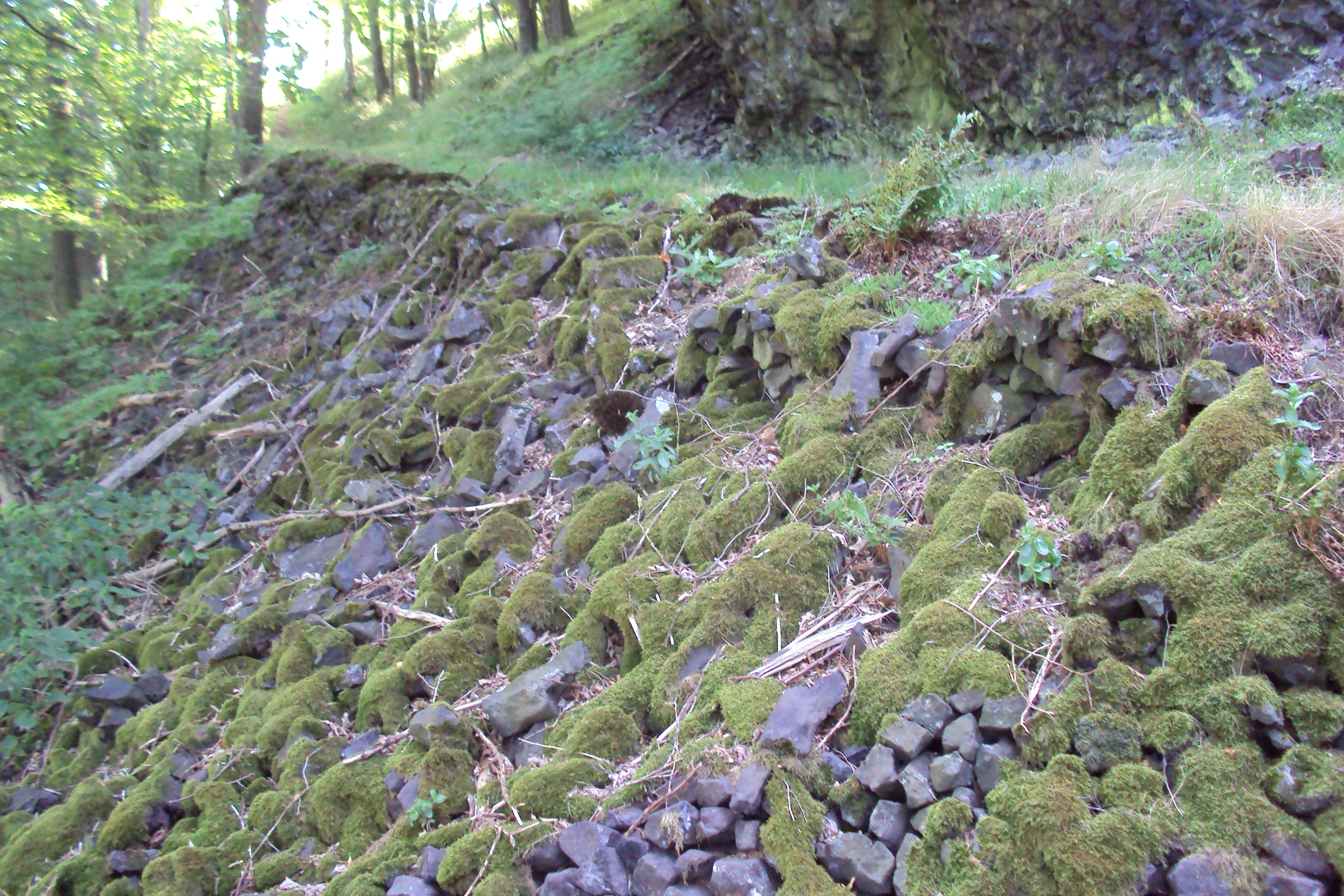 Cesta nahoře pod vrcholem